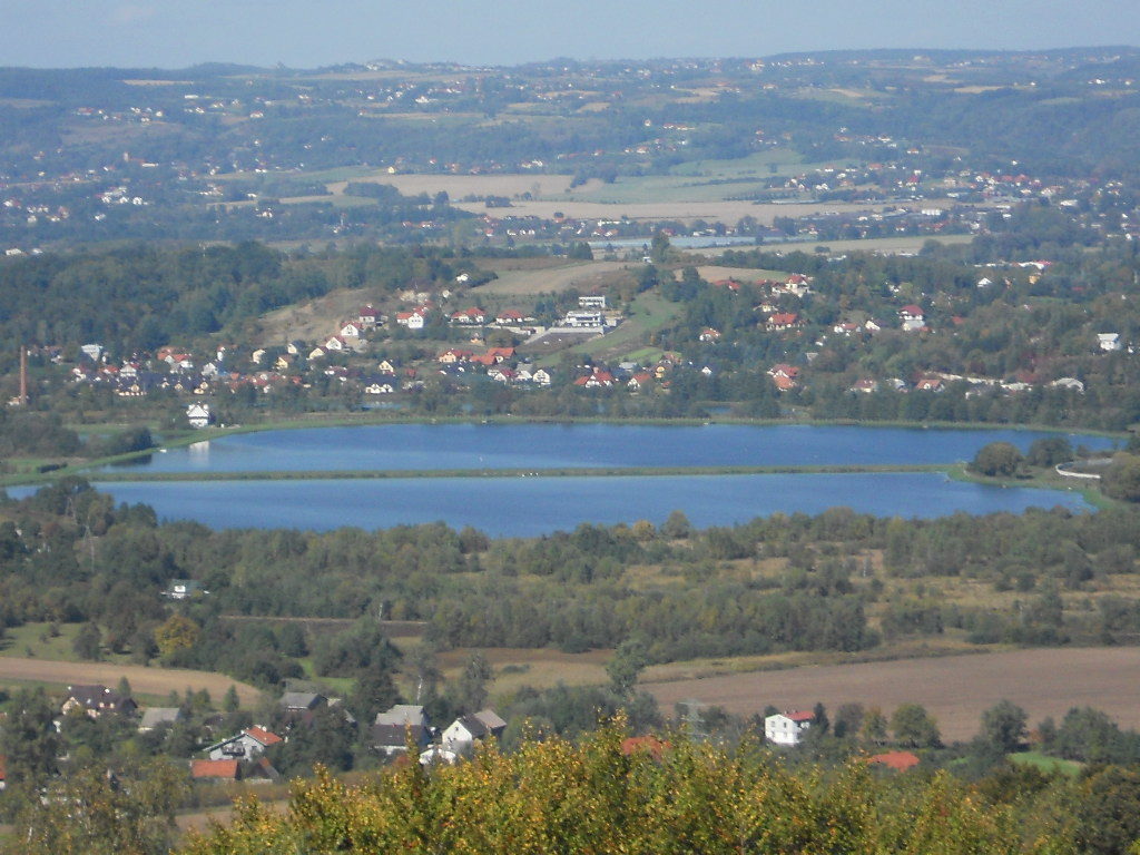 Widok Stawów w Mydlnikach z Kopca Piłsudskiego w Krakowie.